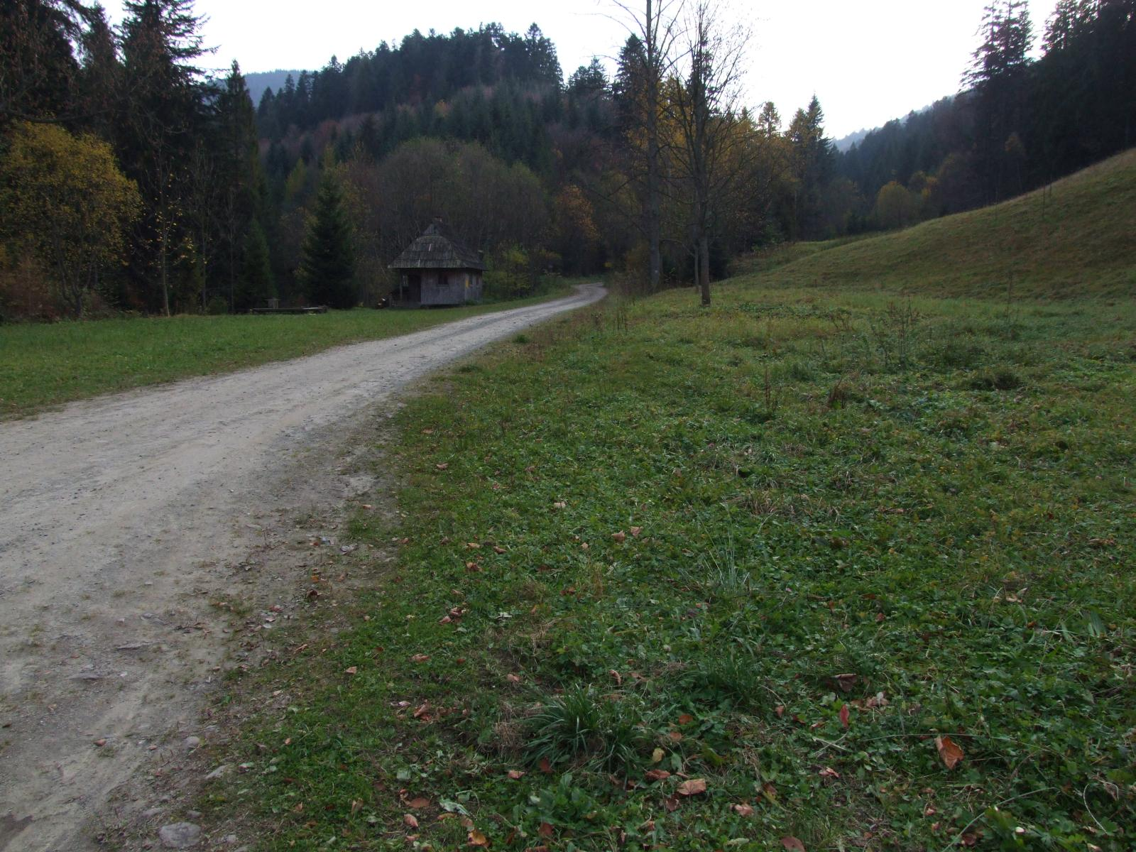 Potasznia w Gorcach (dolina potoku Konina)